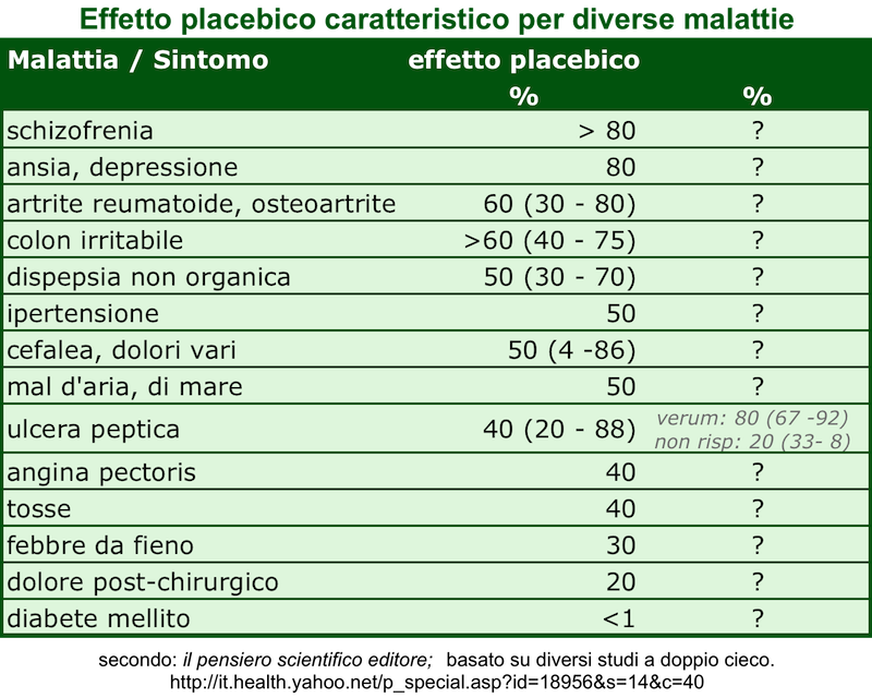 medicina popolare, placebo, placebico, effetto, caratteristiche, malattie